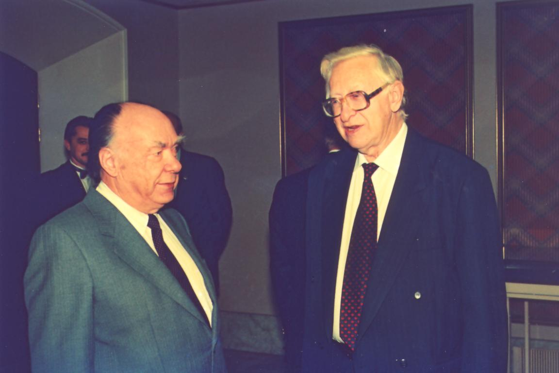 Международная Леонардо-премия